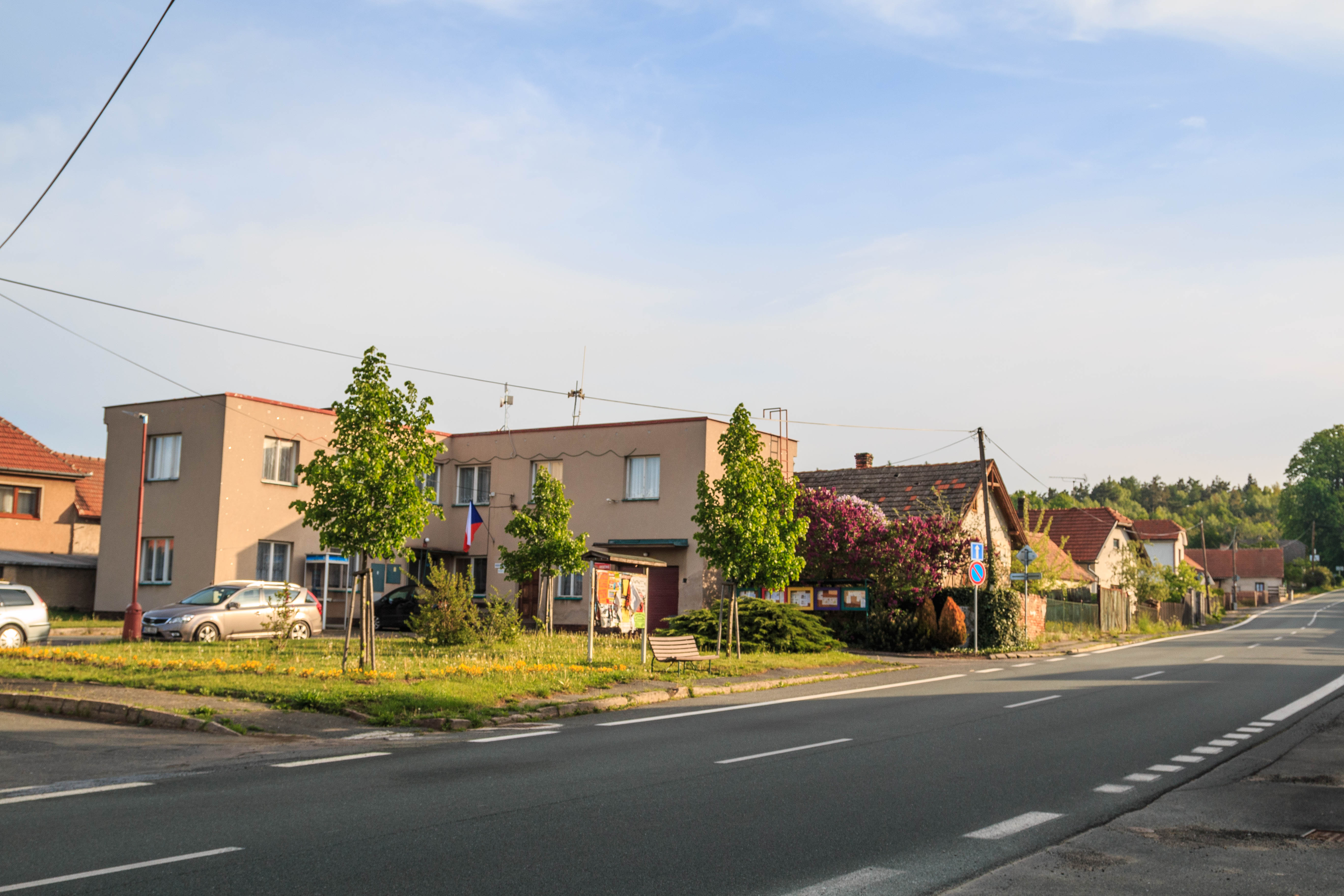 Bernardov obecní úřad